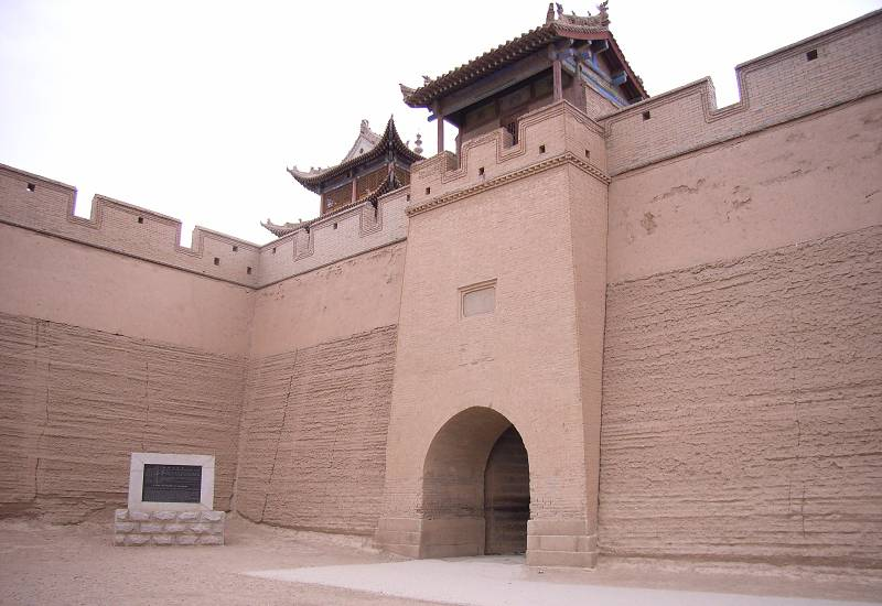 嘉峪关 huowax 摄